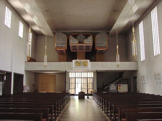 Kirche St. Augustinus, München-Trudering